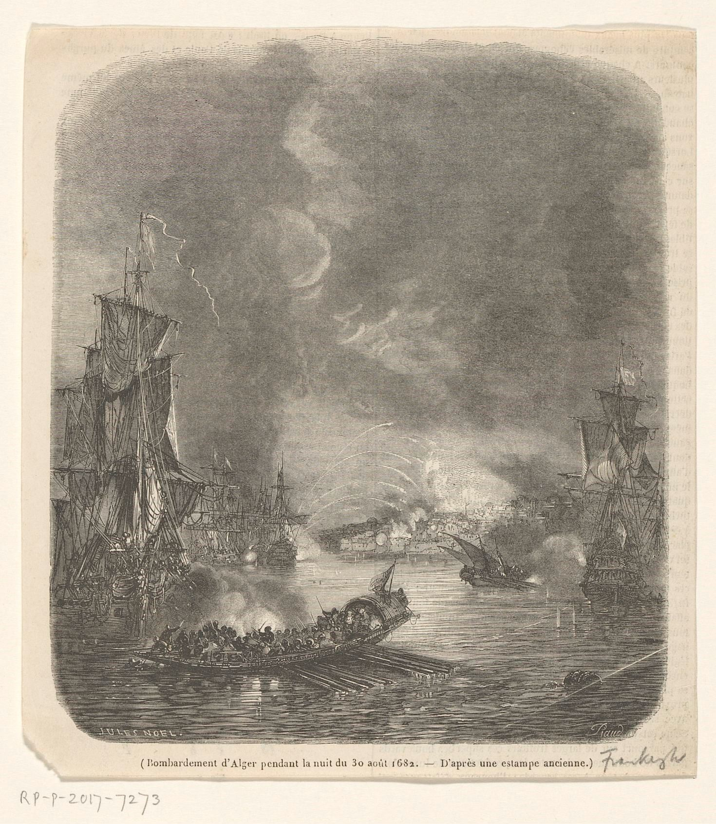 IdentificatieTitel(s): Bombardement van Algiers, 1682. Bombardement d'Alger pendant la nuit du 30 août 1682 (titel op object)Objecttype: prent boekillustratie Objectnummer: RP-P-2017-7273Omschrijving: De stad Algiers gebombardeerd vanaf het water door Franse schepen, 30 augustus 1682. Bedrukt met tekst op de achterzijde.VervaardigingVervaardiger: prentmaker: Antoine Alphée Piaud (vermeld op object)naar ontwerp van: Jules Noël (vermeld op object)Plaats vervaardiging: FrankrijkDatering: 1846Fysieke kenmerken: houtgravureMateriaal: papier Techniek: houtgravureAfmetingen: blad: h 181 mm × b 163 mmToelichtingIllustratie genomen uit een onbekend werk.OnderwerpWat: attack ~ siegeWanneer: 1682-08-30 - 1682-08-30Waar: AlgiersVerwerving en rechtenVerwerving: onbekend 2017Copyright: Publiek domein